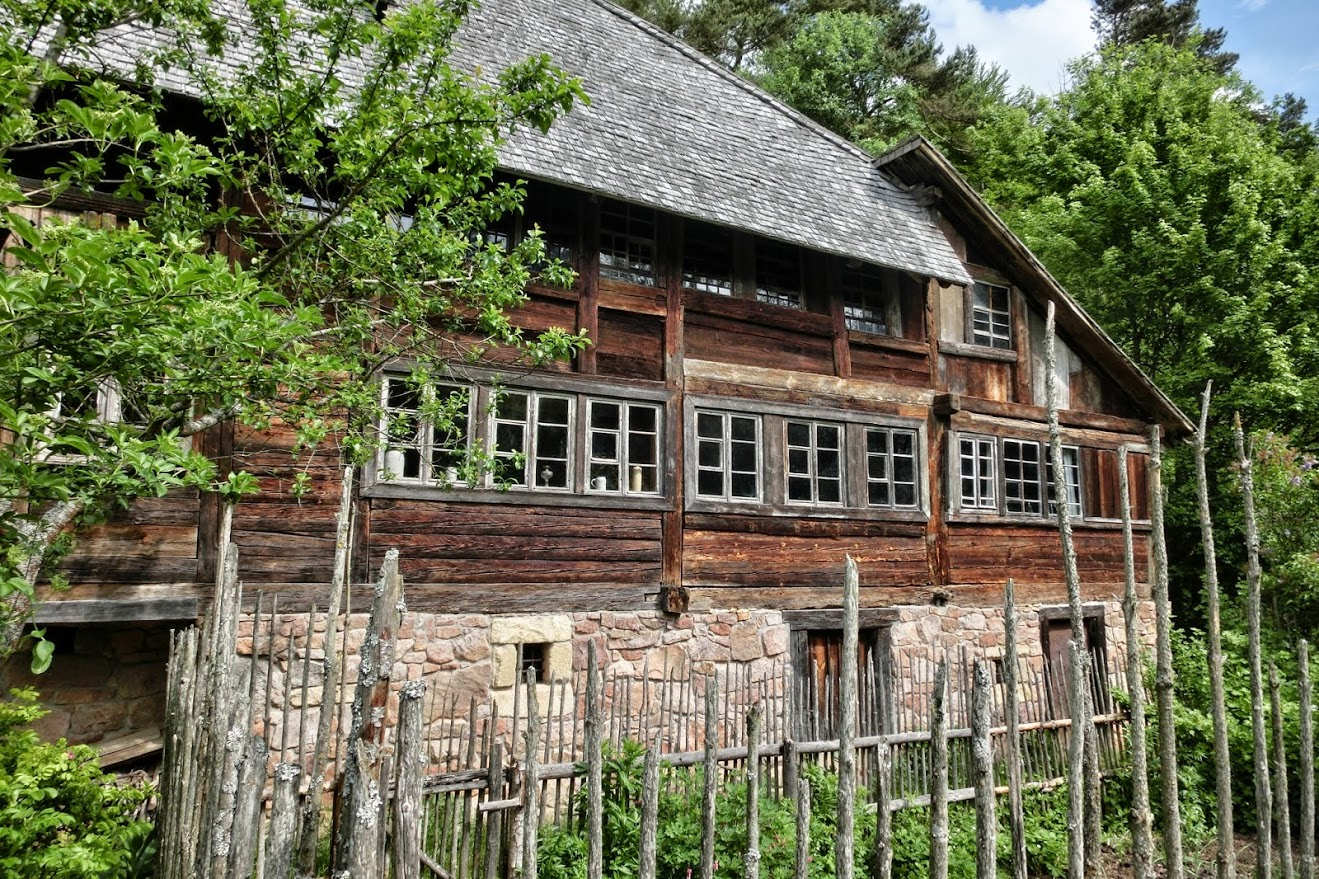 Deutschland - Baden-Württemberg - Landkreis Tuttlingen - Neuhausen ob Eck: Freilichtmuseum - Haldenhof